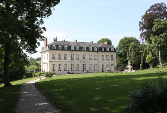 Château de Ménil-Hubert